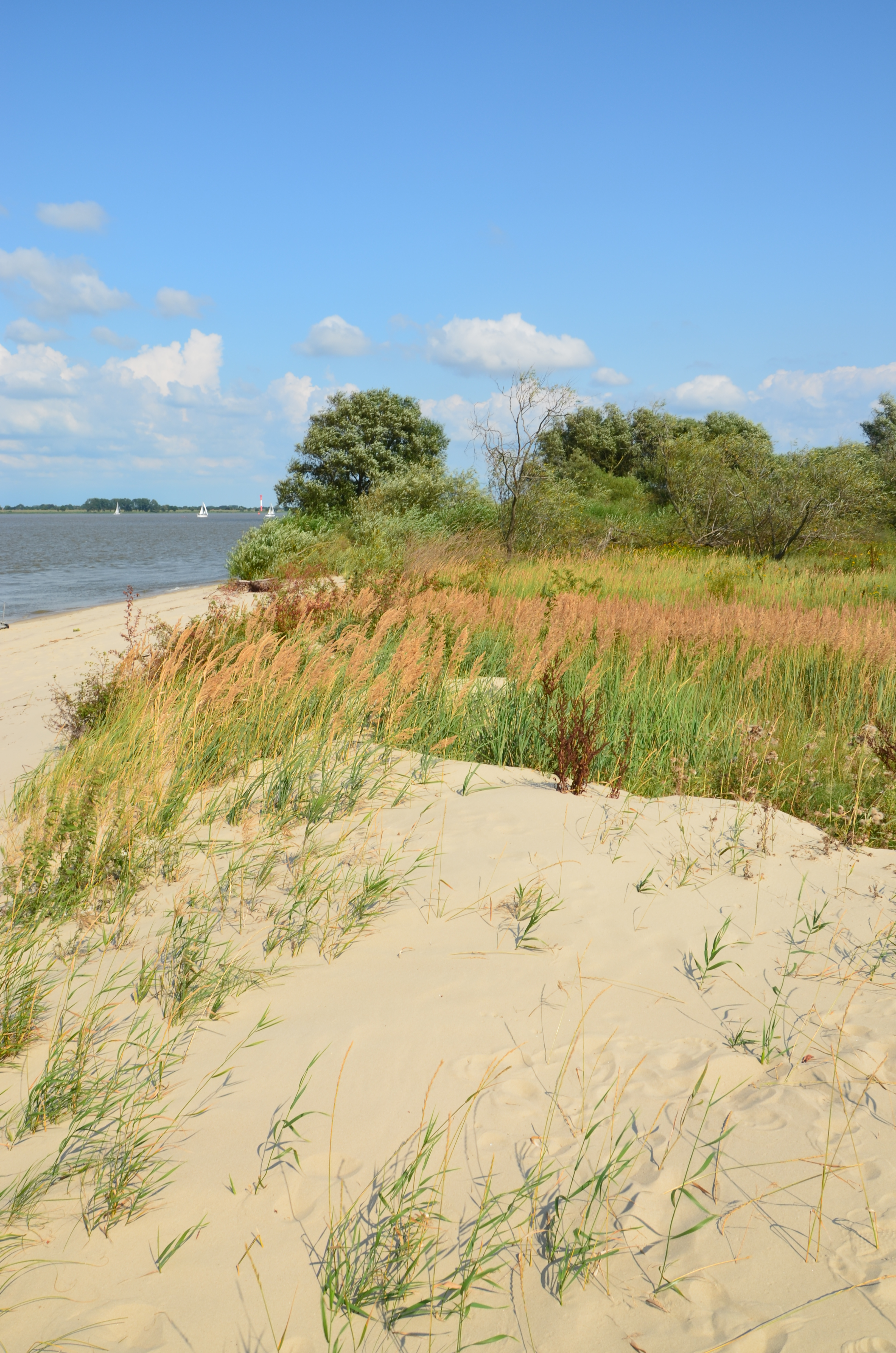 Elbinsel Schwarztonnensand